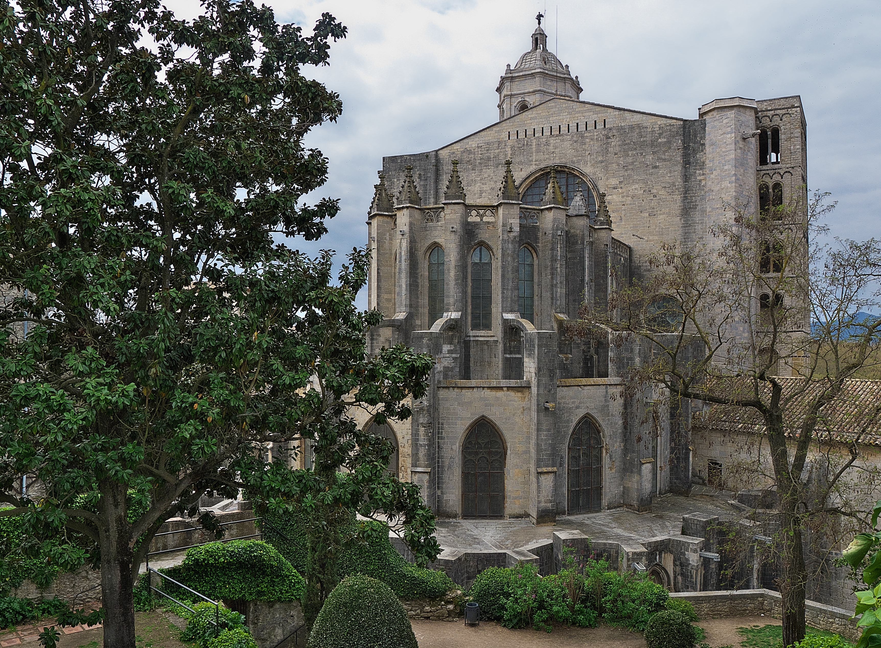 Las distintas etapas artística en la soberbia catedral. Románico, gótico, neoclásico ...